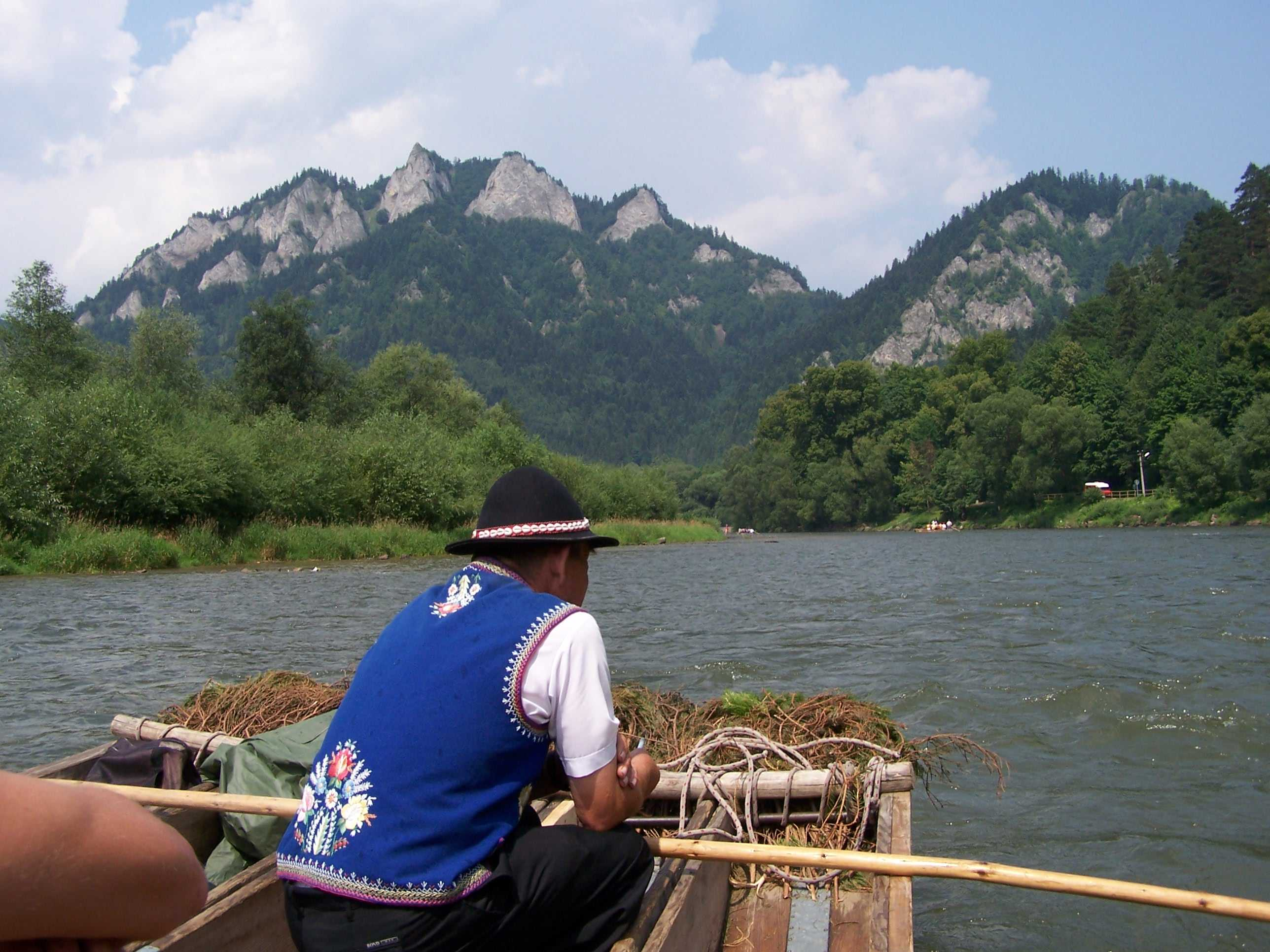 Flisak